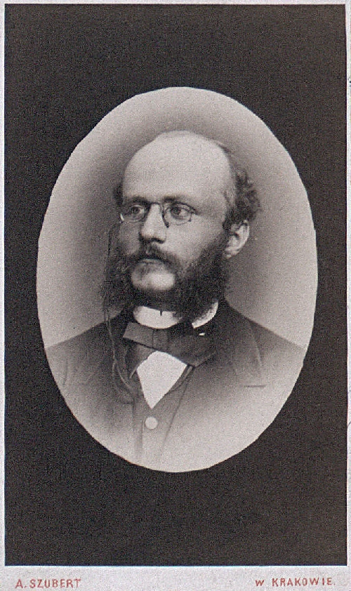 Henryk Jordan (1842-1907). Własność Biblioteki Jagiellońskiej w Krakowie